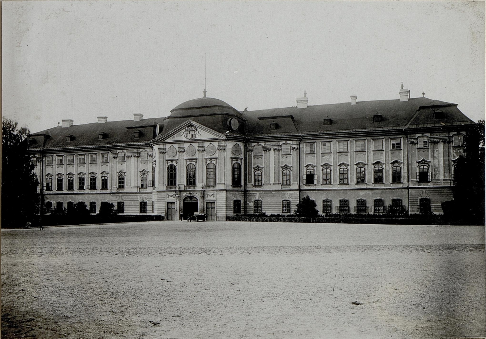 Erzherzog Karl war von Juni 1916 an, Oberkommandierender eines Teilabschnittes der Ostfront und befehligte mehrere Armeen zwischen Brody und den Karpaten. Im Rahmen dieses Kommandos inspizierte Erzherzog Karl seine ihm zugeordneten Einheiten.